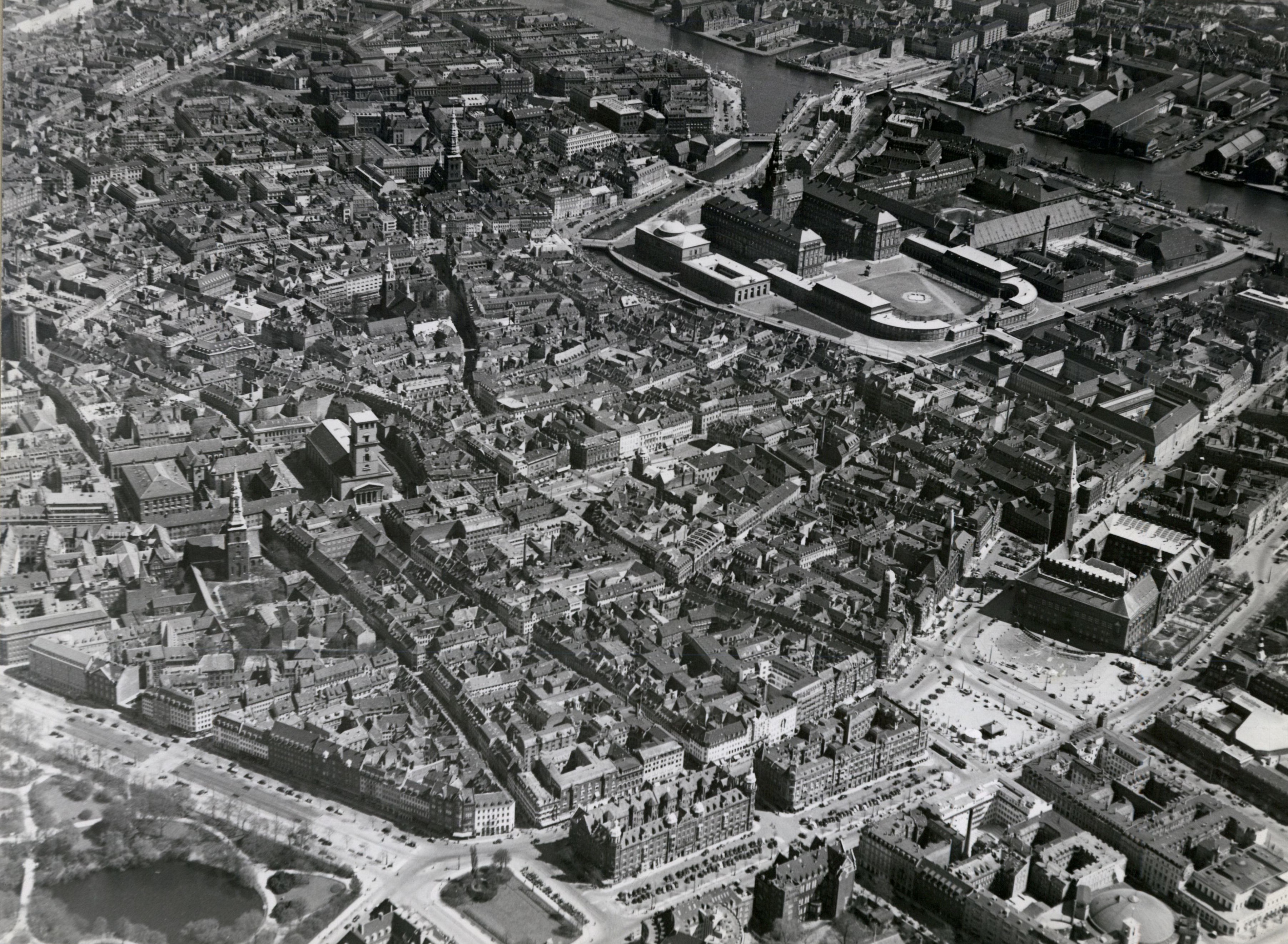 Slotsholmen. Set fra Jarmers Plads.